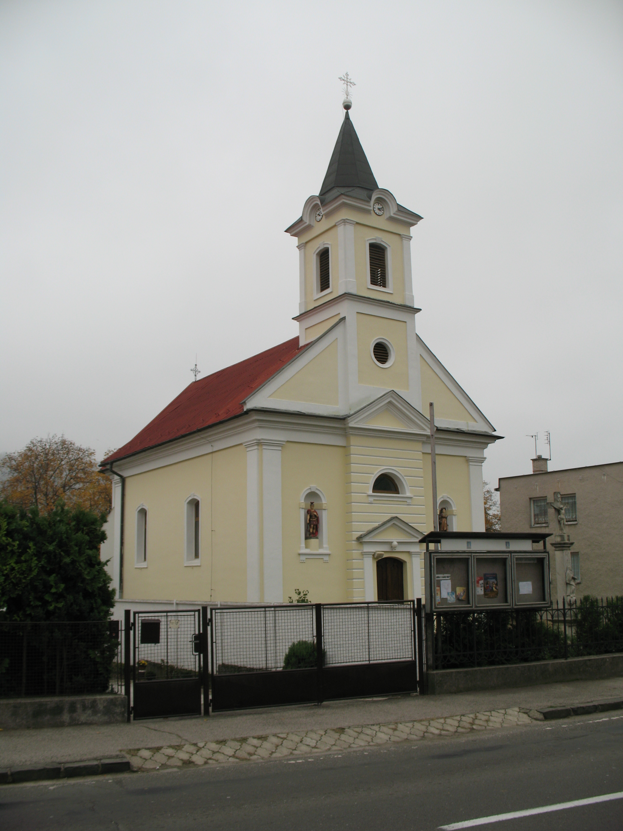 Alsóvesztény